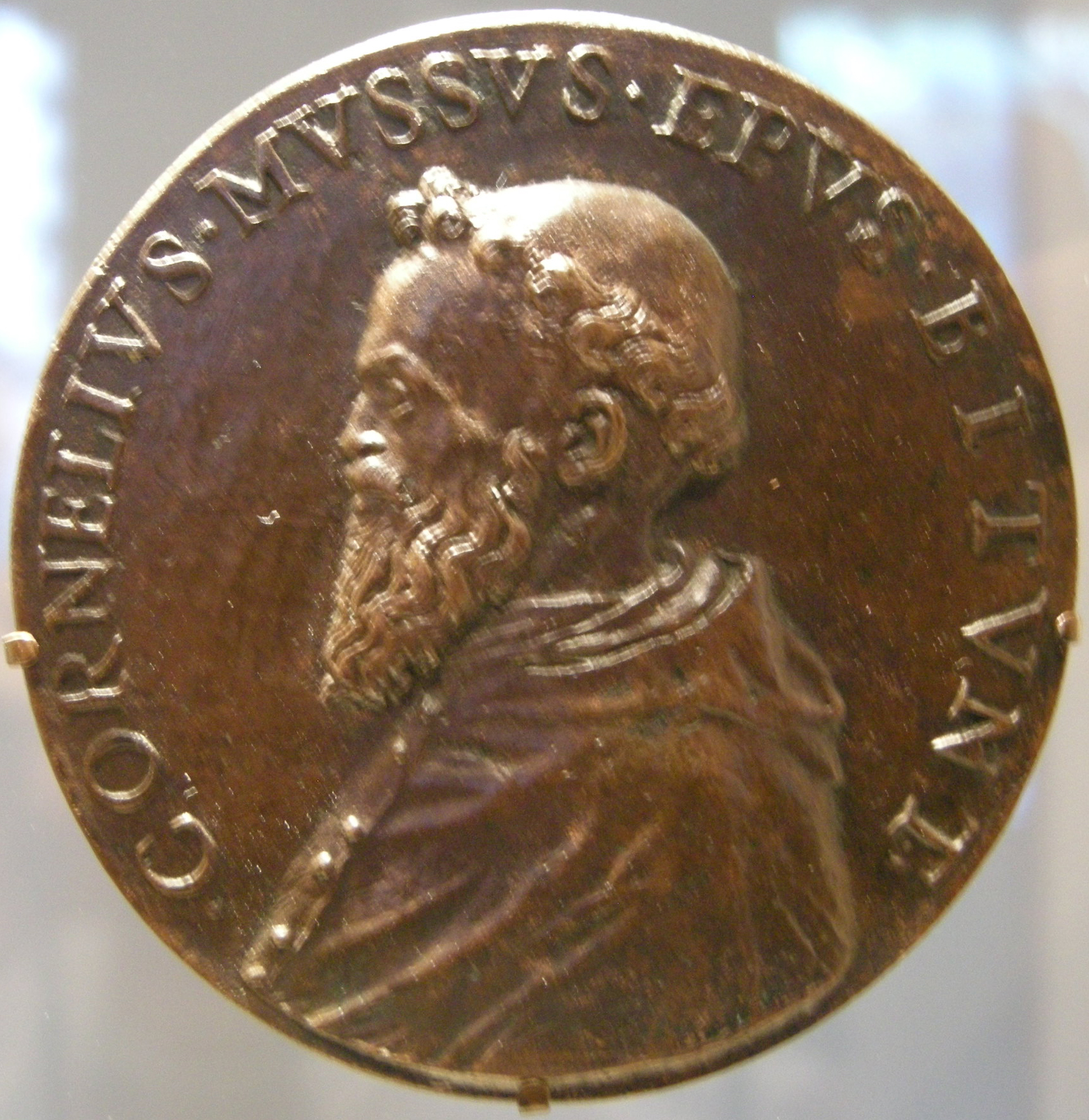 Artista italiano del XVI sec., Cornelio Musso di Piacenza (1511-1574)